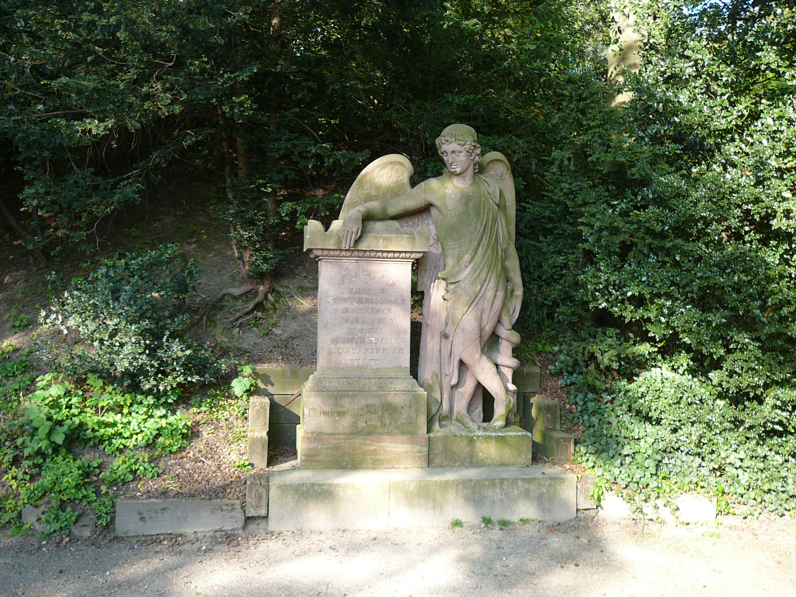 Hardt-Anlagen, Wuppertal. Denkmal für Johann Anton Stephan Diemel (Wuppertaler Wundarzt, 1763-1821). Die Figur ist ein Thanatos Skulptur: Peter Joseph Imhoff (1768-1844), 1823 [1]